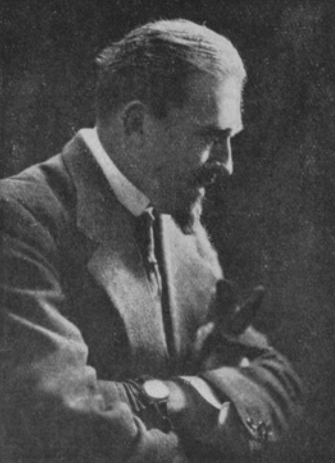 Antonio Piatti (1865 - 1962)